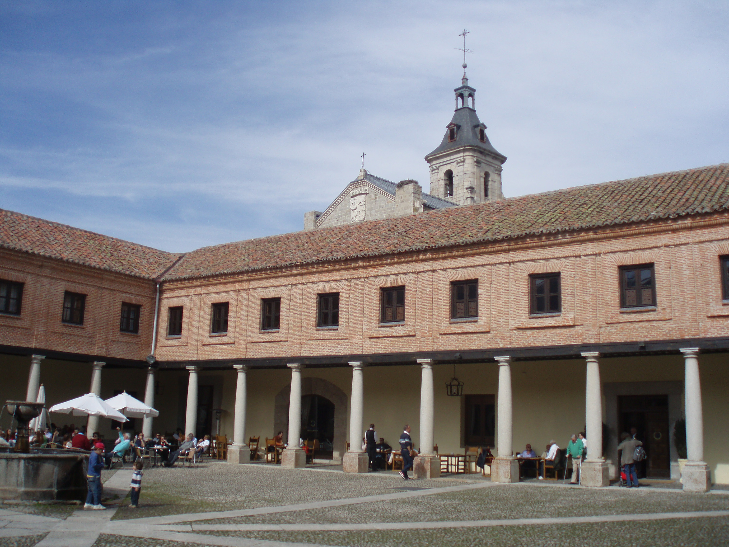 Monasterio de El Paular desde el claustro donde está el hotel (Sierra de Guadarrama, España).